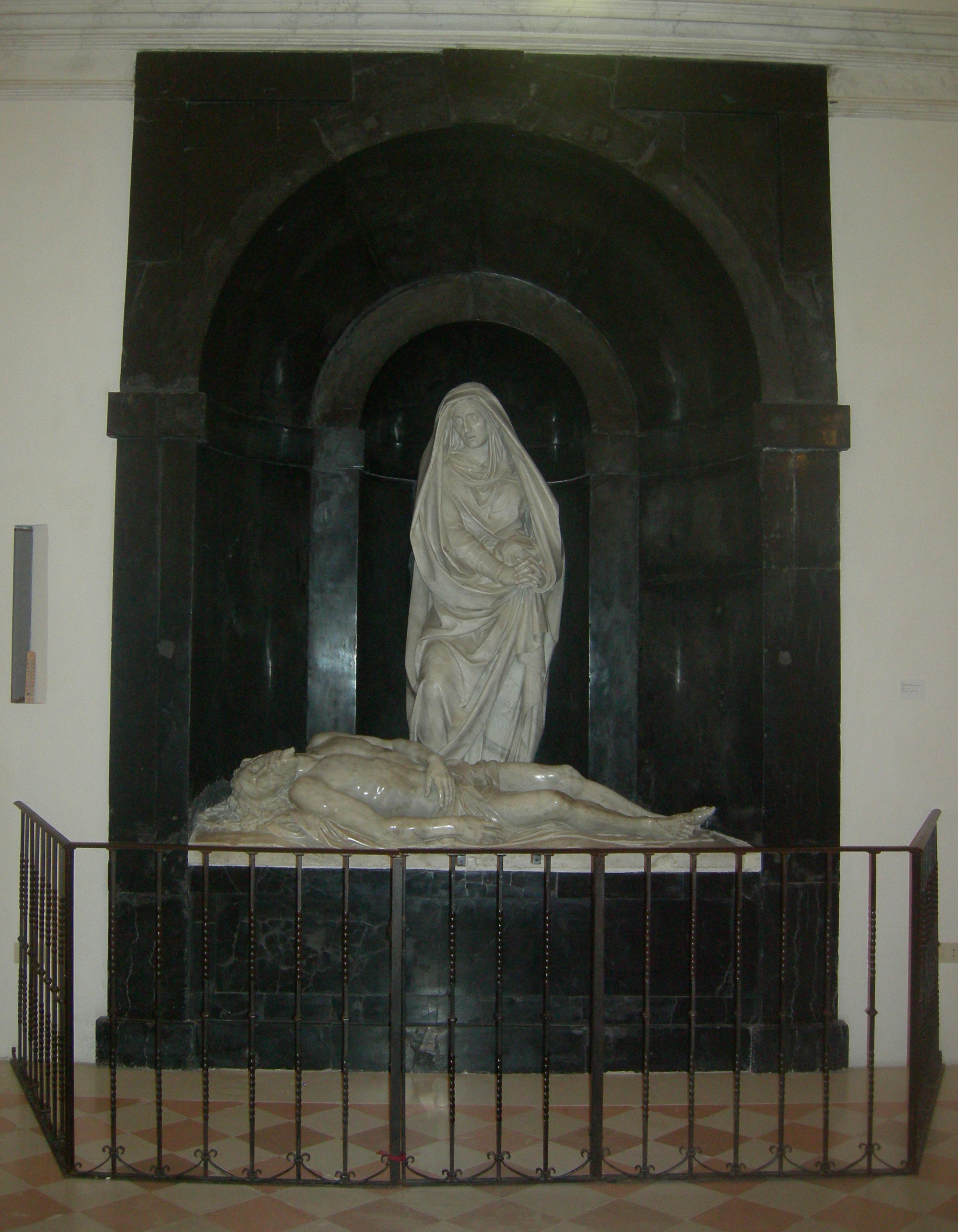 La Pietà di Giovanni Bandini nell'Oratorio delle Grotte di Urbino.